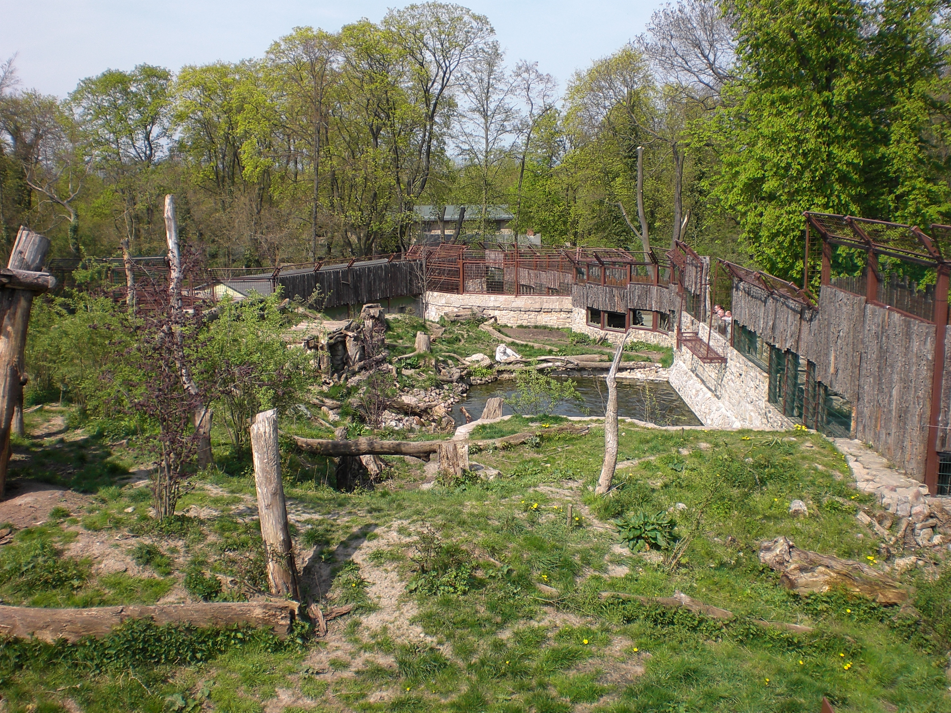 Tigergehege im Zoo Aschersleben